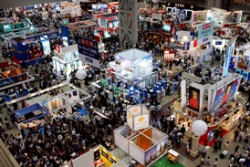 JATAWTF2006